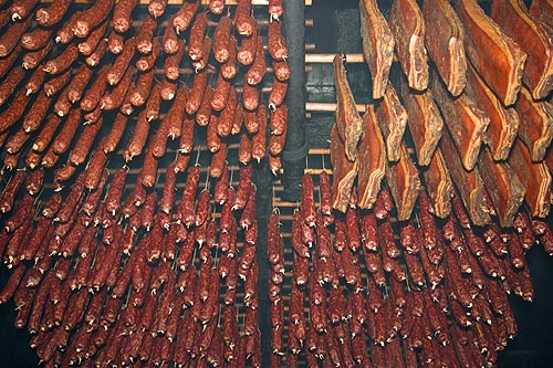 Freilichtmuseum Ballenberg